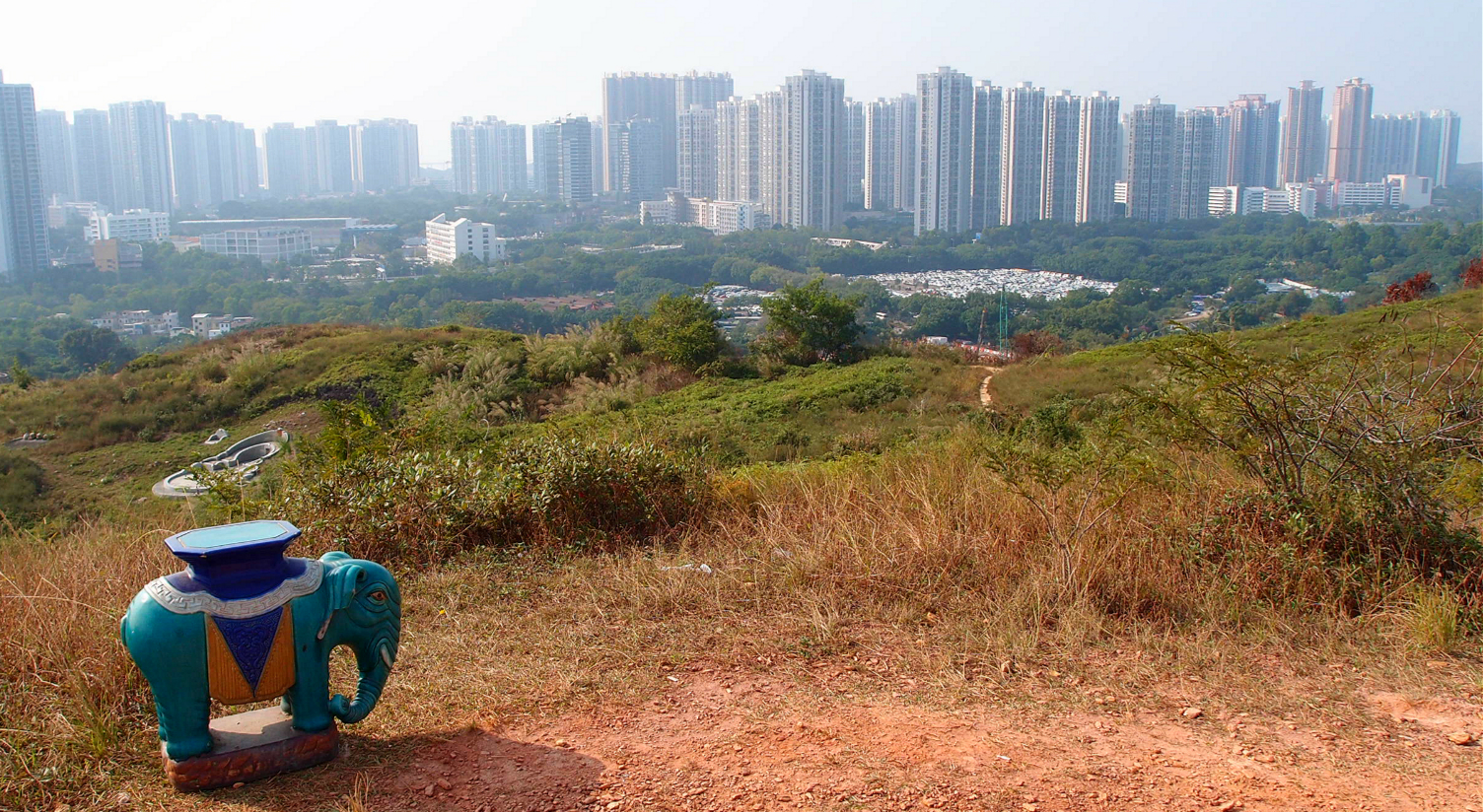 中文（香港）: 刪除刪除刪除